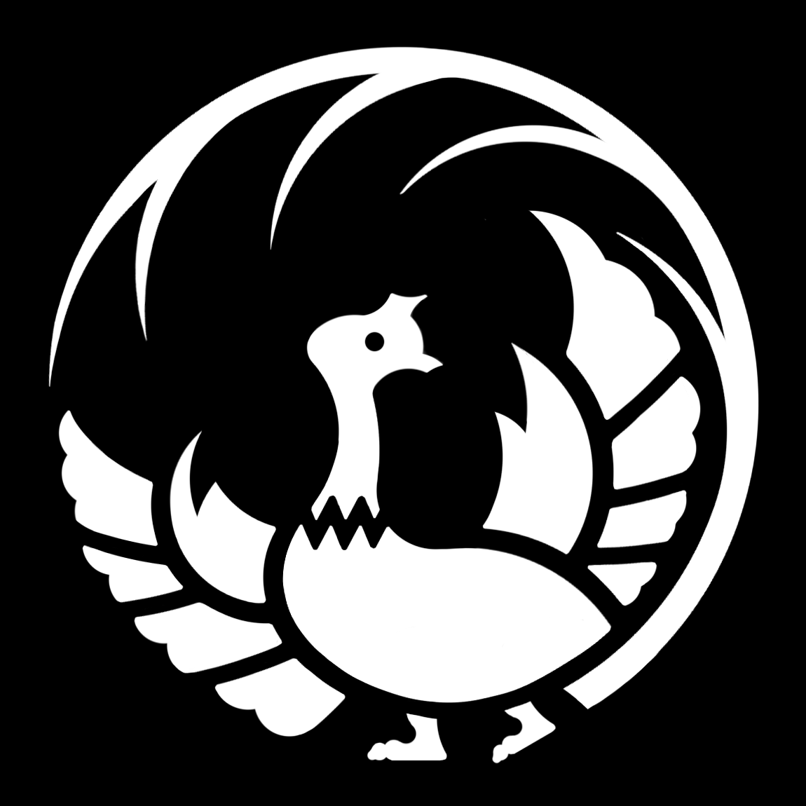 「歌舞伎座鳳凰の丸」紋（染抜）